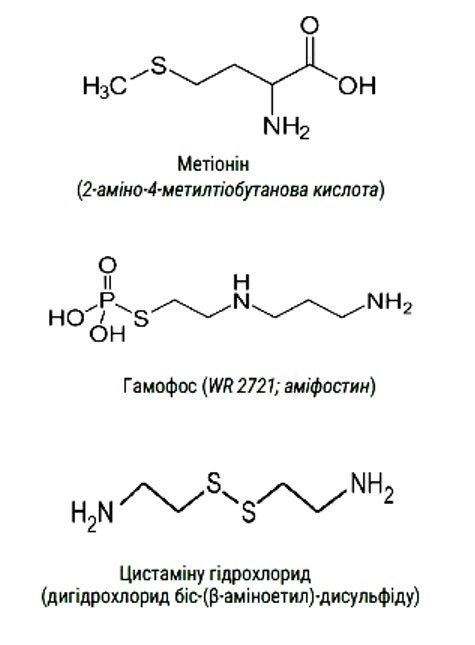 Цистамин